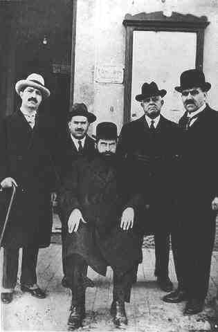 Seated: Rabbi Judah Leon Halfon, founder of Shivat Zion society in Tetuan. Standing: Left to Right: Dr. Ariel Benzion, the Jewish National Fund emissary to Spanish Morocco, Mr. Abraham Benwualid of the local community and Mr. Kansino of Manchester, England.